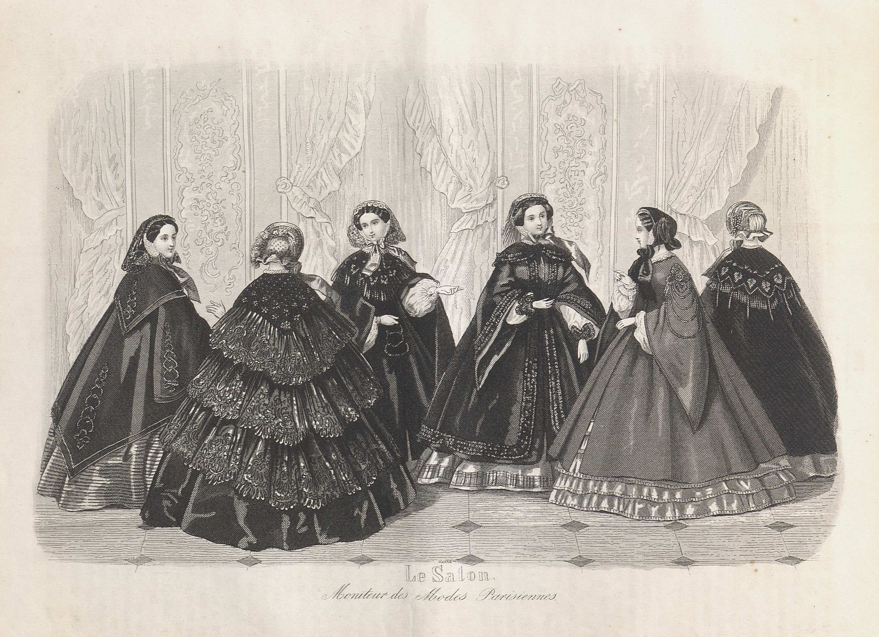 Kappa; Sjal: Klänning; Hatt; Flor; Plymer; Spets; Pelerine; Band; Blommor